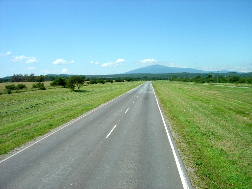 Trancas, Tucuman - Ruta Nacional N° 9